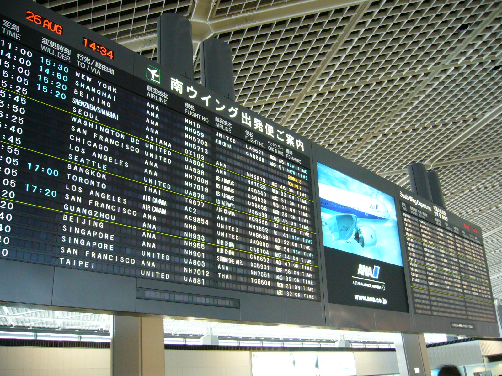 electric-scoreboard,narita-airport,japan